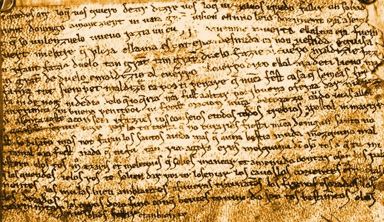 Manuscrito de la "Disputa del alma y el cuerpo", poema medieval castellano.